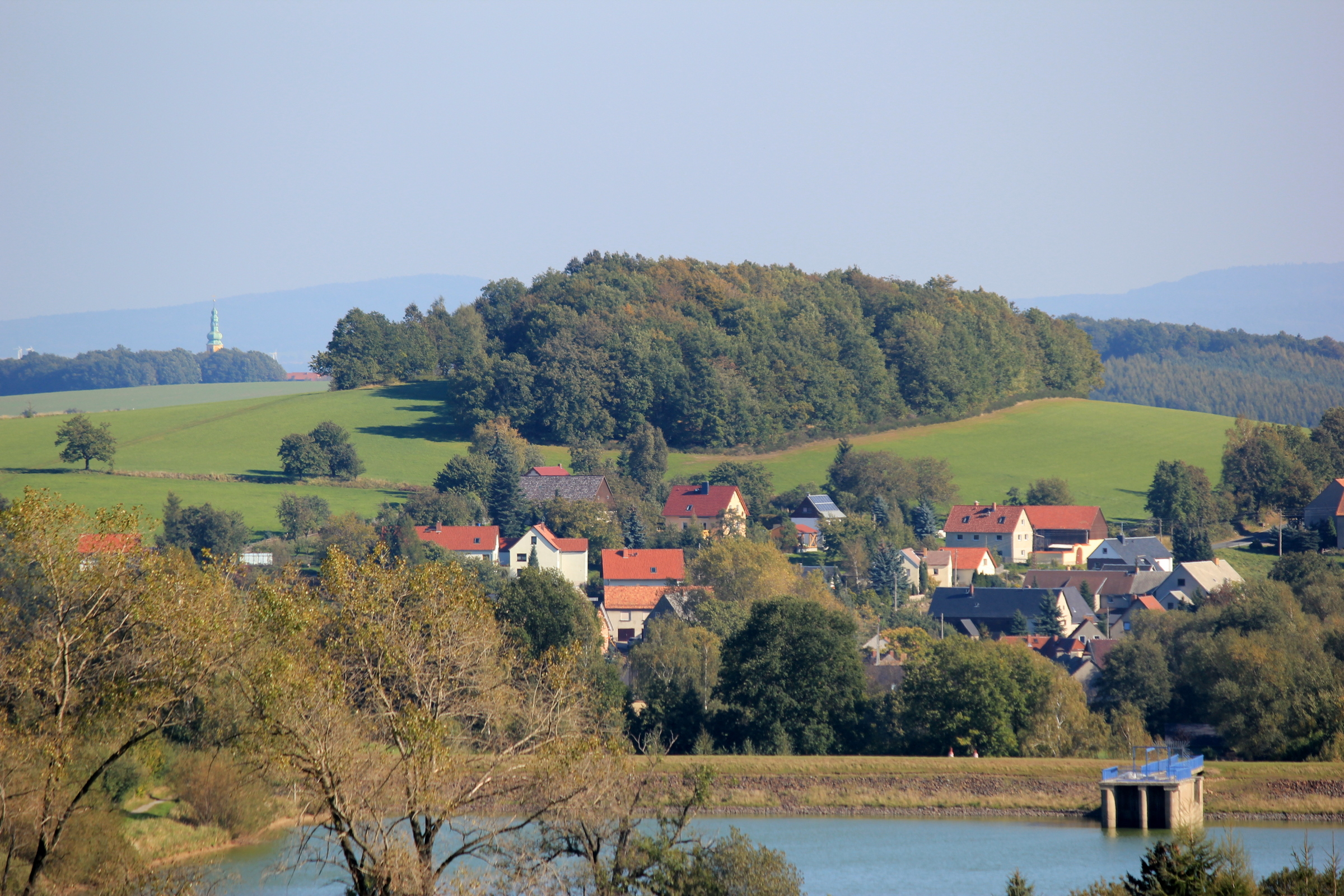 Rachlau bei Kubschütz, im Vordergrund der Stausee. Hornjoserbsce: Hornjołužiska wjeska Rachlow pod Čornobohom ze spjatym jězorom.